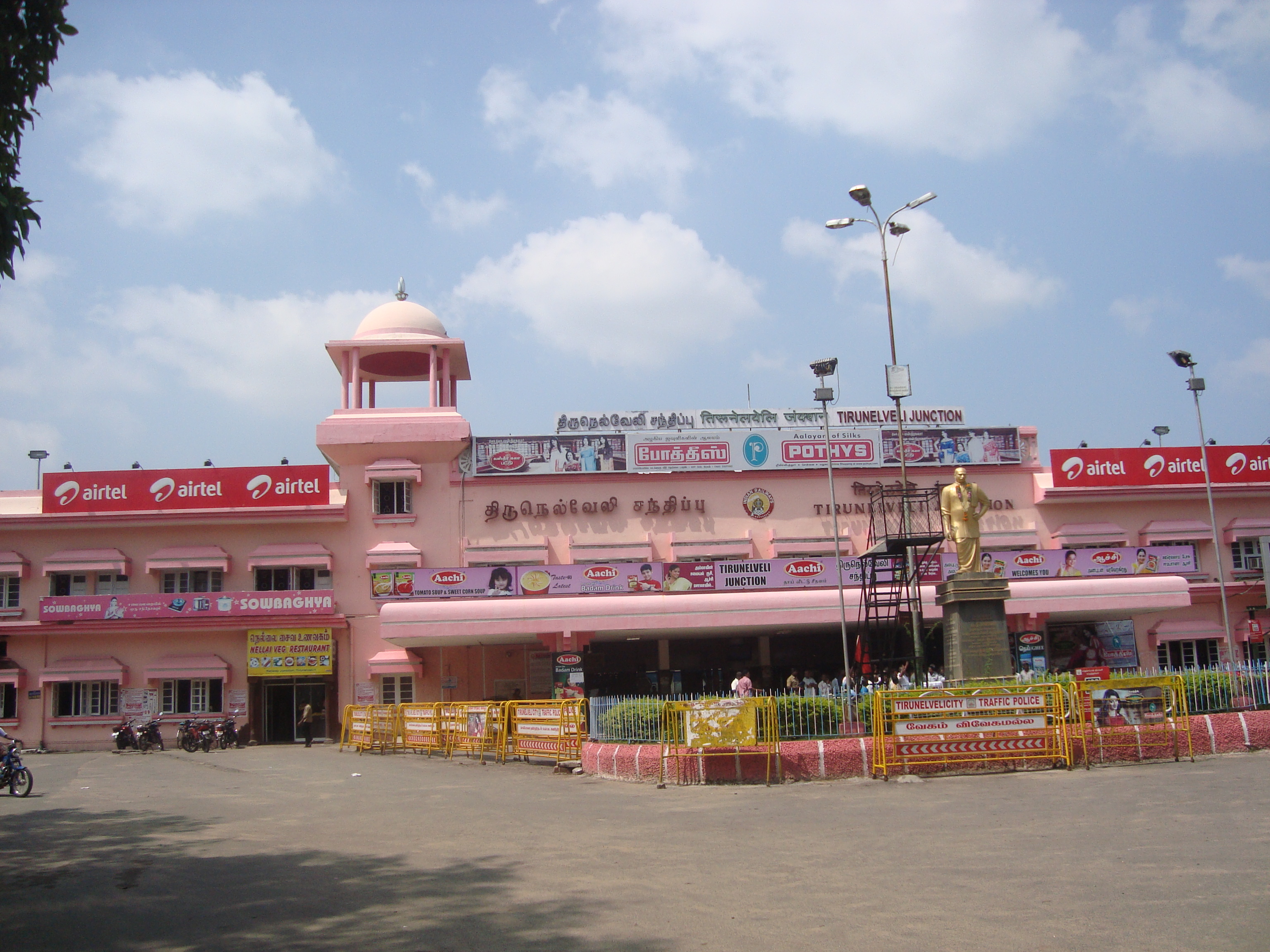 திருநெல்வேலி சந்திப்பு தொடருந்து நிலைய முன் பகுதிUnknown tirunelveli junction front view